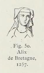 Alix de Bretagne